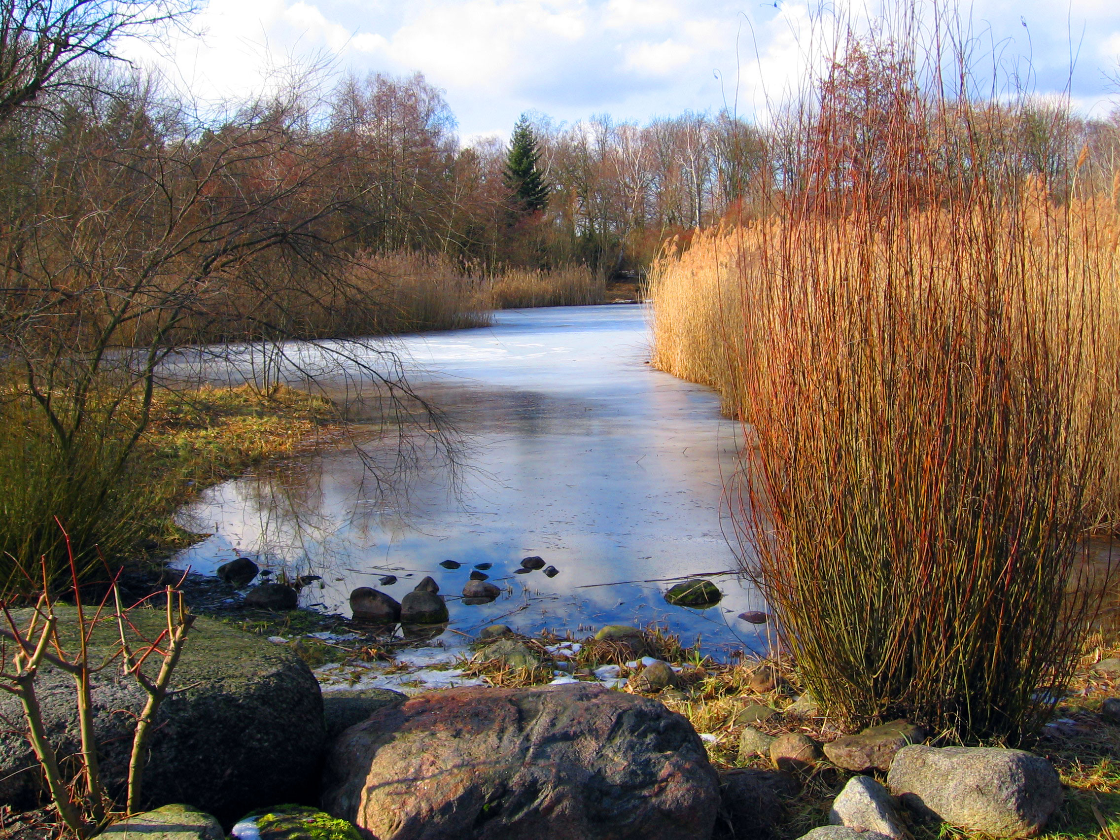 Kleines Biotop im Volkspark Hasenheide in Berlin